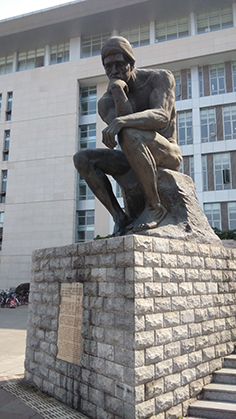 The Poet in front of the library on Liulin Campus of the Southwestern University of Finance and Economics in Wenjiang District, Chengdu.